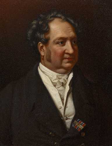 König Maximilian I. Joseph von Bayern (1756-1825)